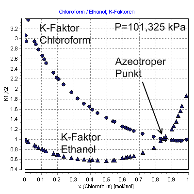 Diagramm zeigt K-Faktoren des binären Gemischs Chloroform/Ethanol